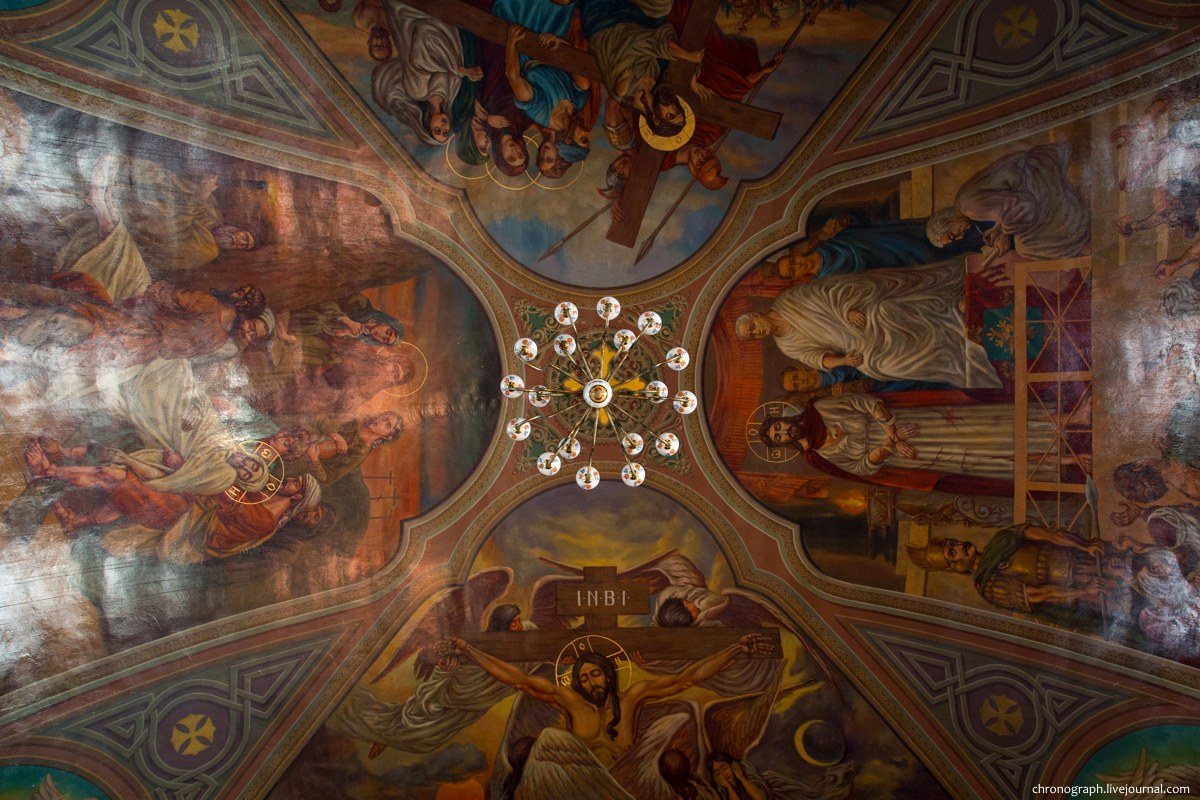 Роспись на потолке Вознесенского храма. Вознесенский Сызранский мужской монастырь